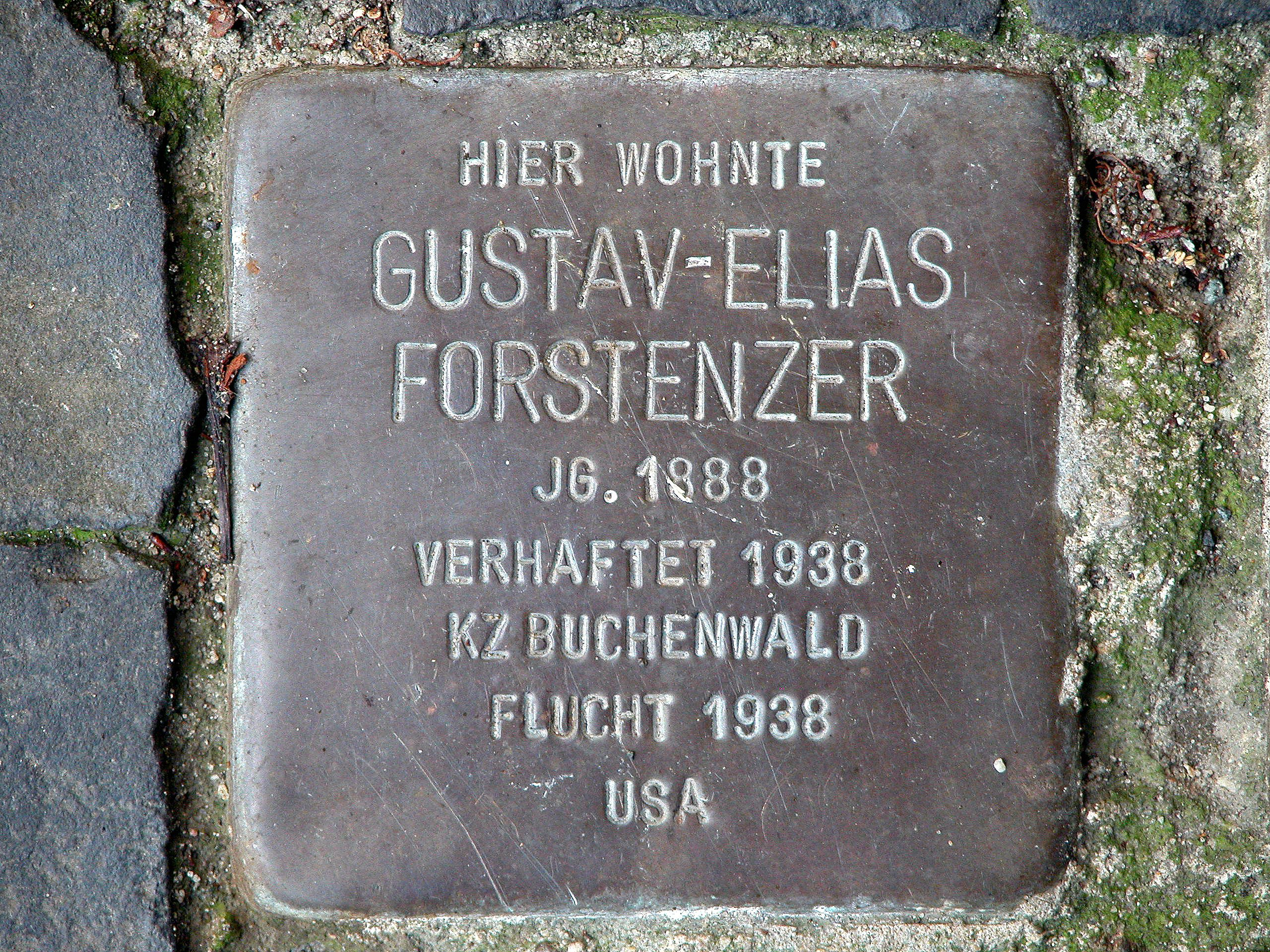 Braunschweig: „Stolpersteine“ für Gustav-Elias Forstenzer. Brunswick, Germany: “Stolperstein” (stumbling block) project, Gustav-Elias Forstenzer.